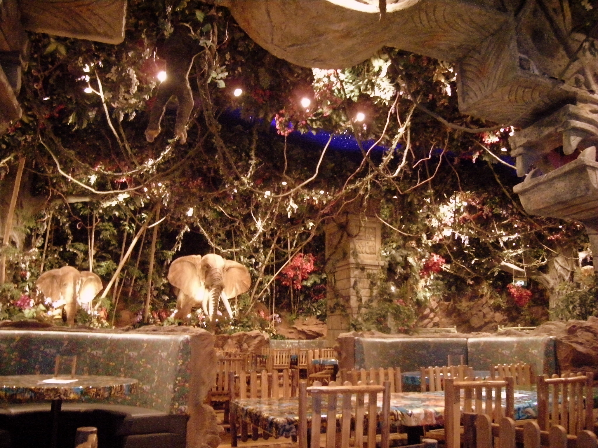 ... dentro do Dubai Mall